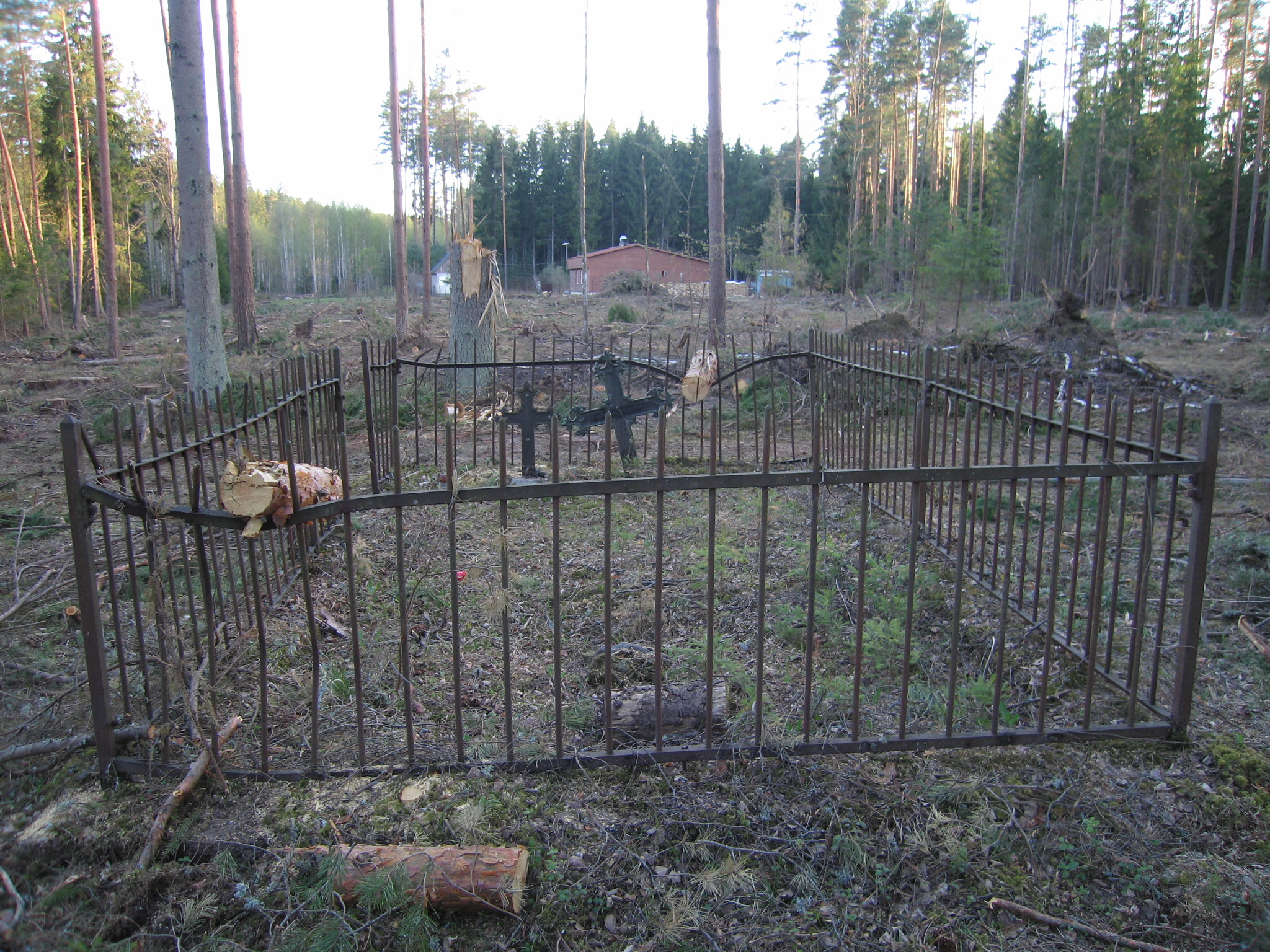 Kirdevaade Taari talu kalmistule